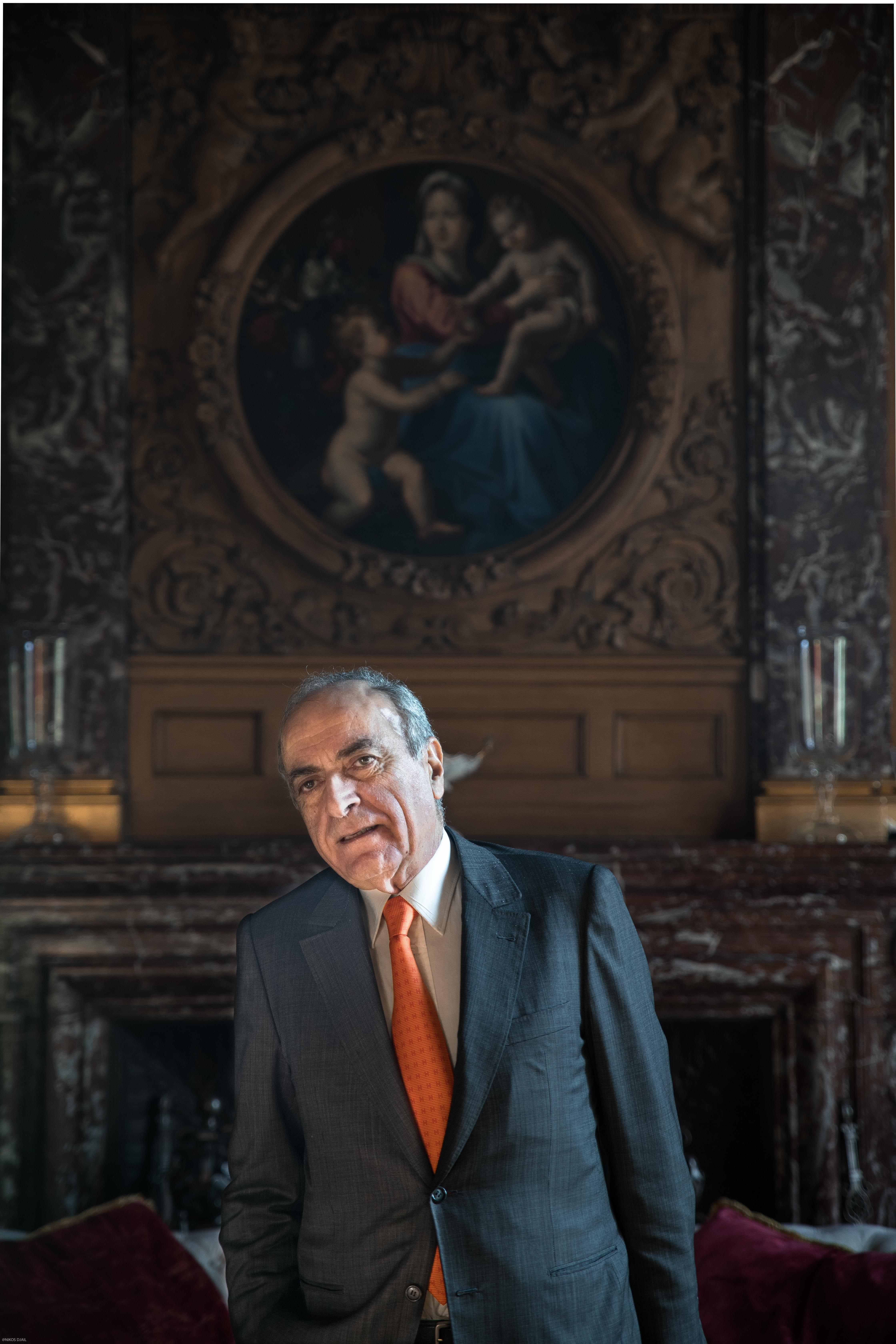 Ziad Takieddine, dans le salon de son hôtel particulier, à Paris. Photographié par Nikos Djail